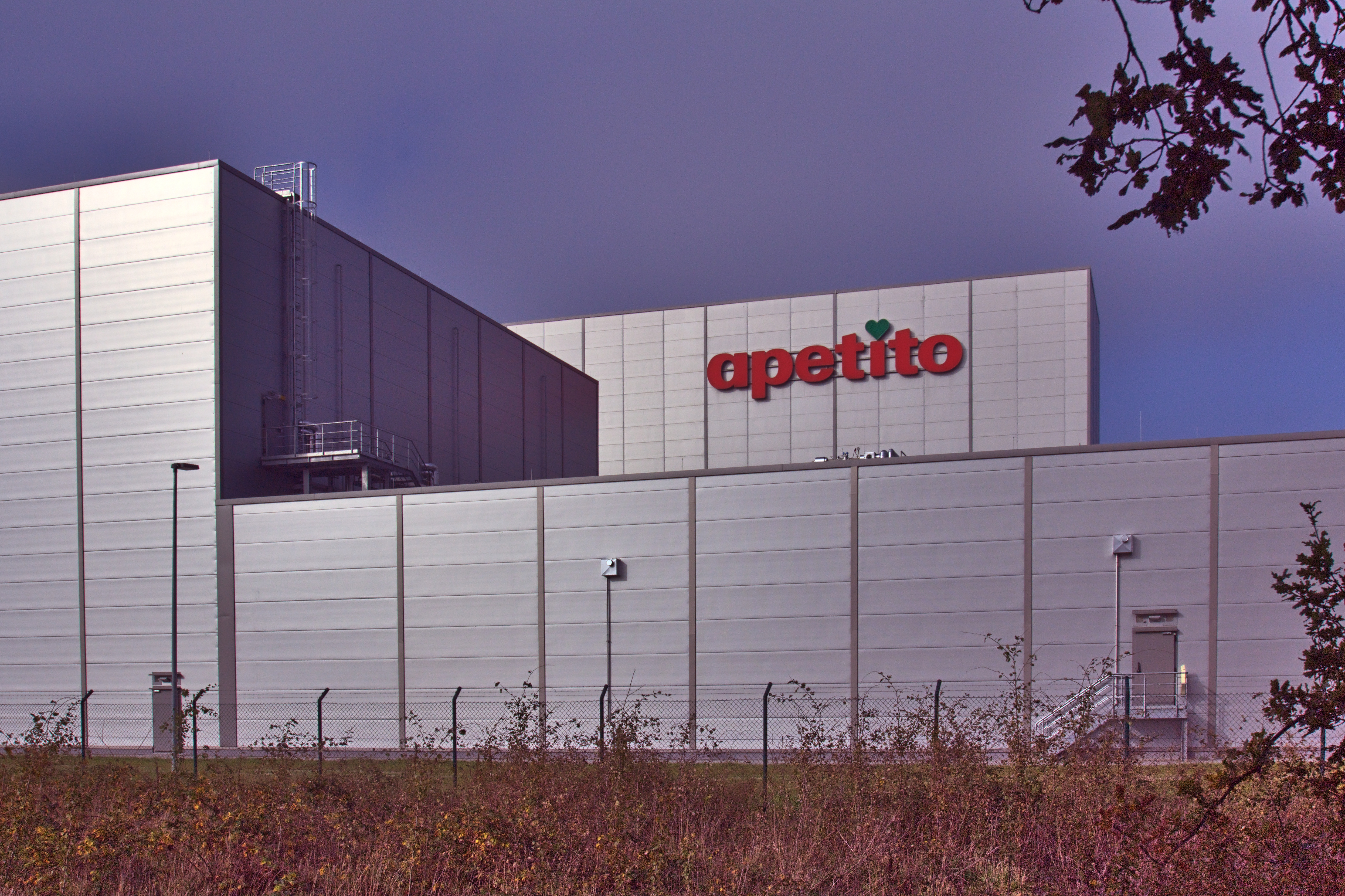 Rheine, Bonefatiusstraße; Apetito